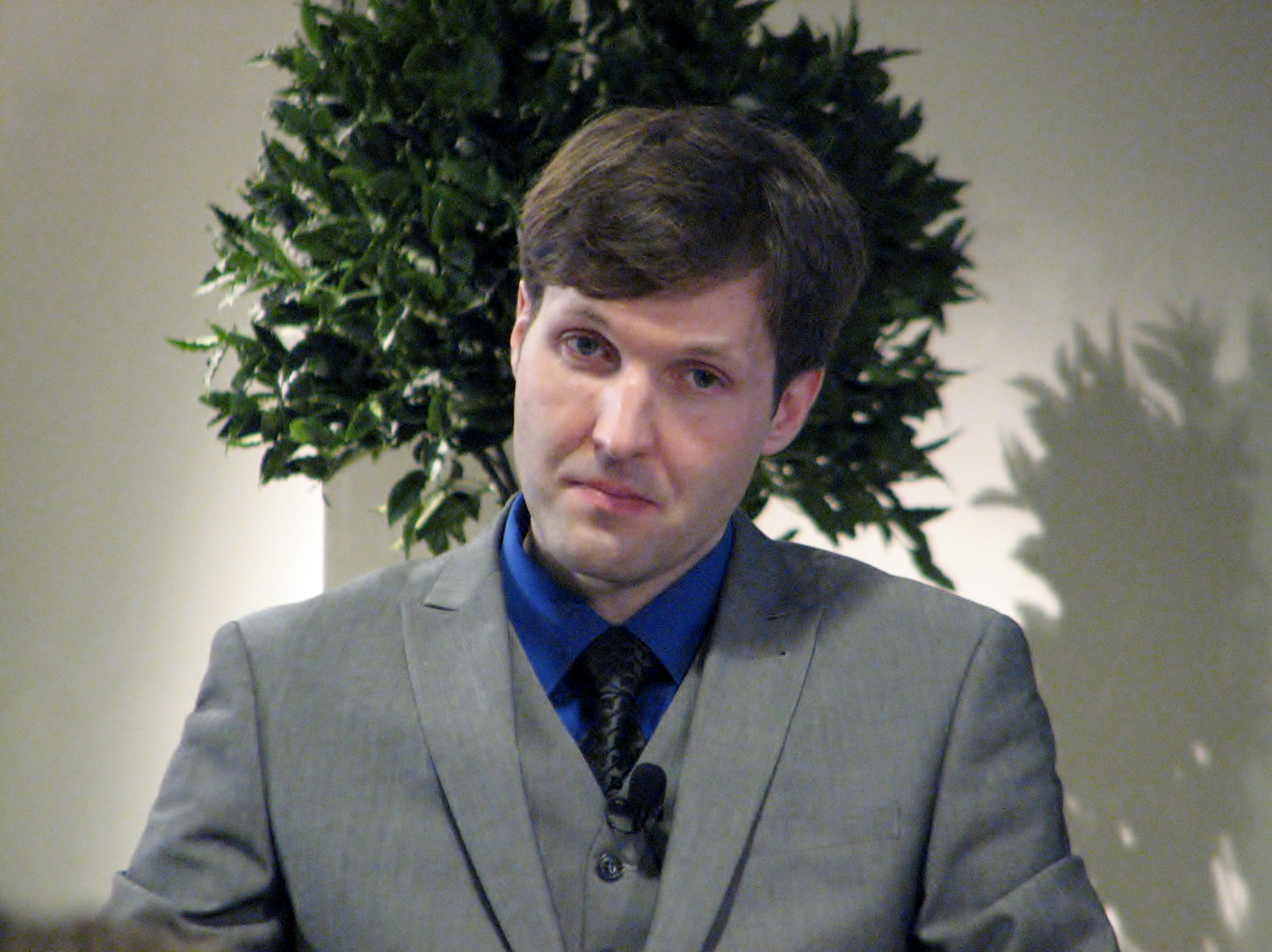 Martin Helme Nordic Hotel Forumis toimunud Euroopa Parlamendi valimisdebatil „Kuidas tõmmata Euroopa majandus kraavist?“